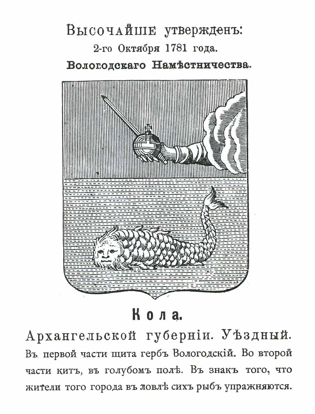 Official Russian Empire coat of arms Kola. Герб Российской Империи уездного города Кола Архангельской губернии (в 1781 - Вологодского наместничества) с официальным описанием в Гербовнике Винклера. Изображена рыба кит в представлении художника 18 века.